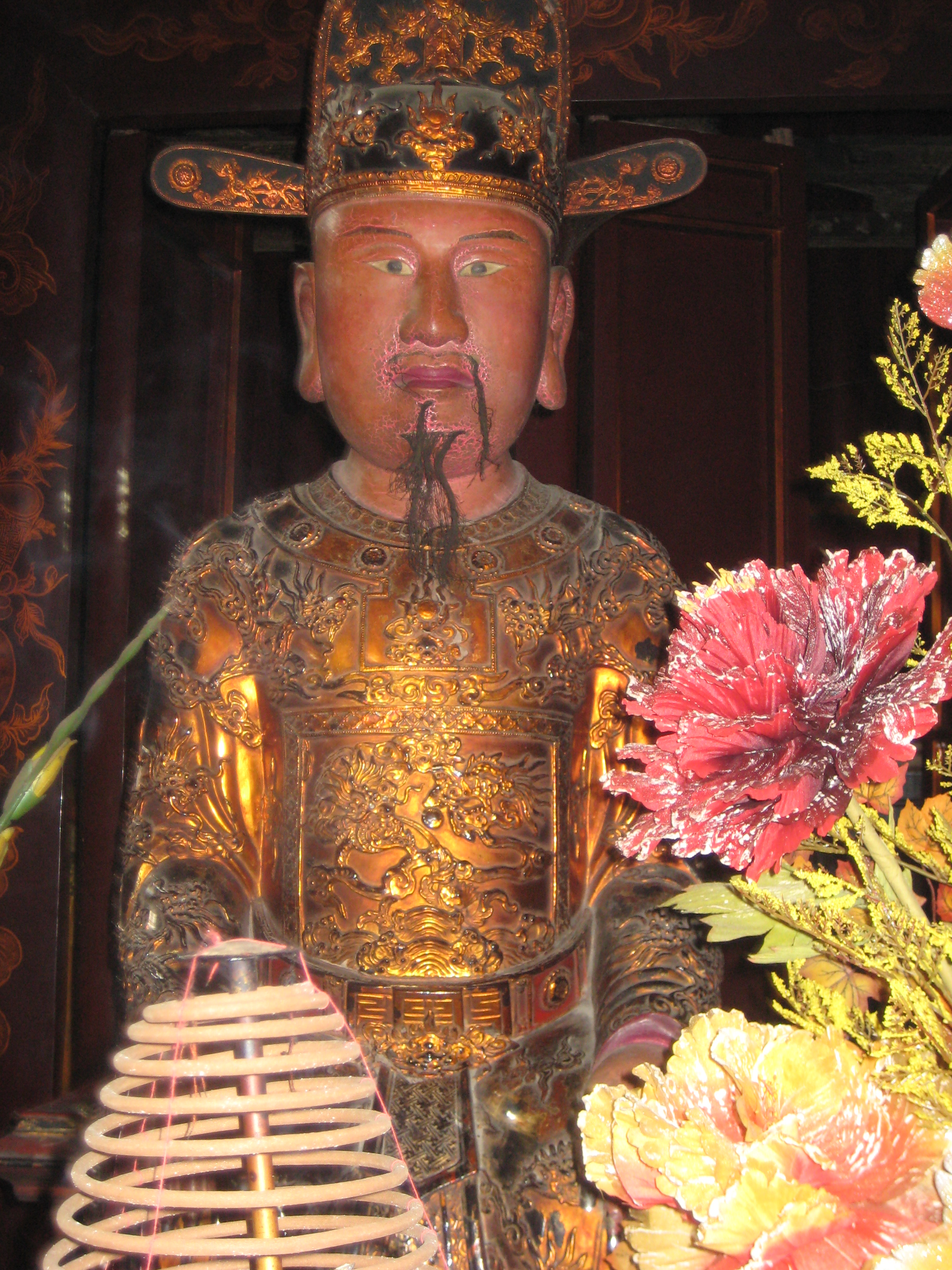 Tượng Lê Long Đĩnh ở Cố đô Hoa Lư